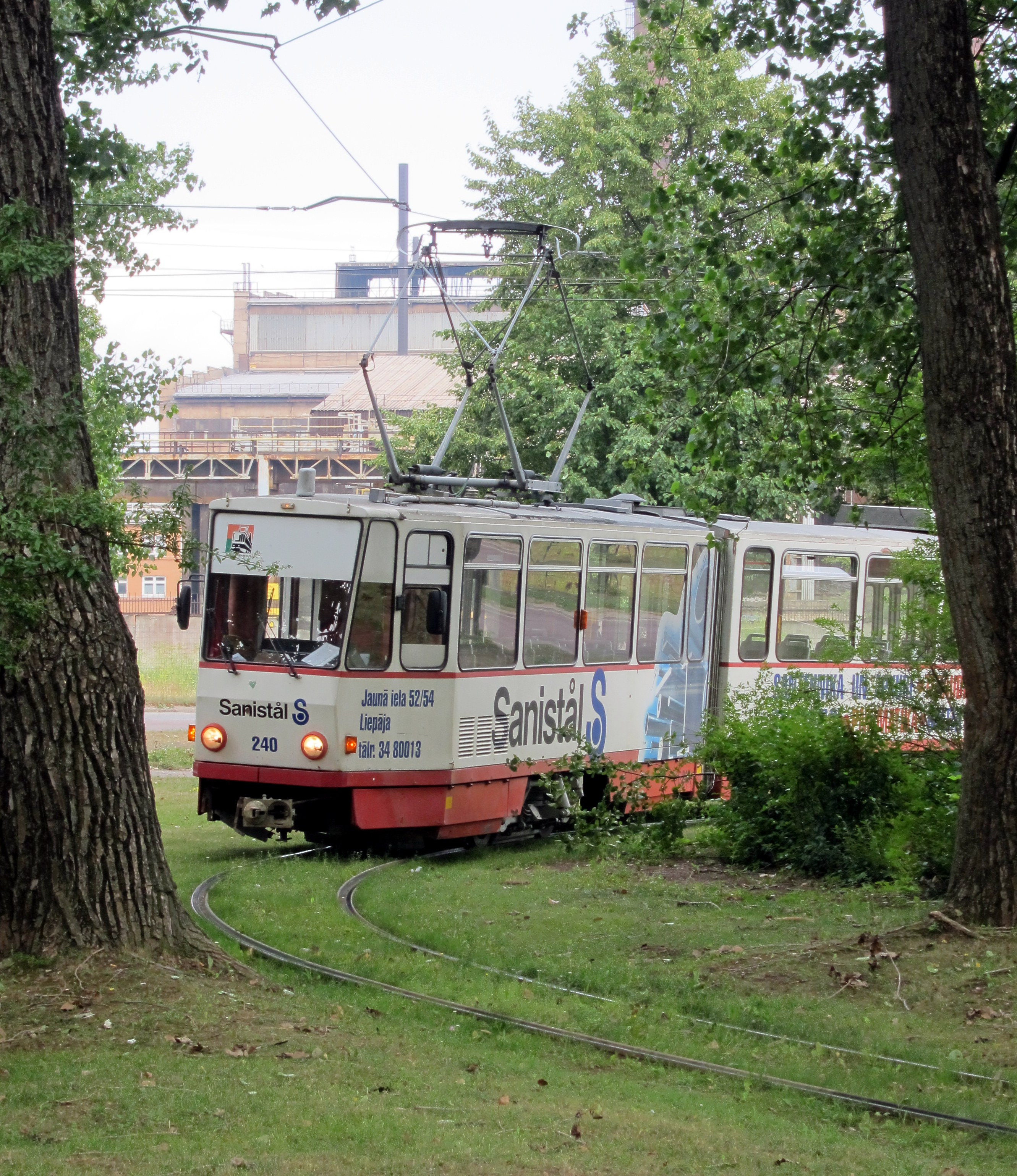 Tramvajs Liepājā, Brīvības ielas galapunktā